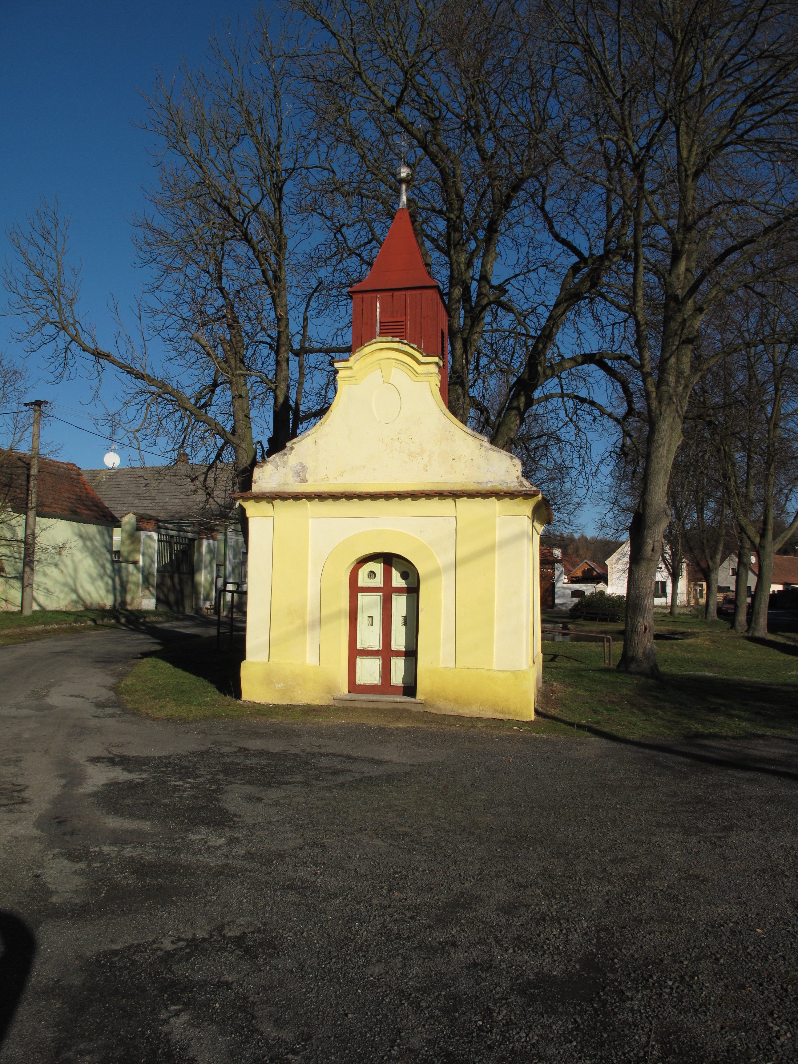 Kaplička v Chalupách. Okres Plzeň-jih, Česká republika.